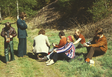 Fotowanderung nach Naundorf-Colmnitz, 1976. Fotograf: Gerhard Böhm.